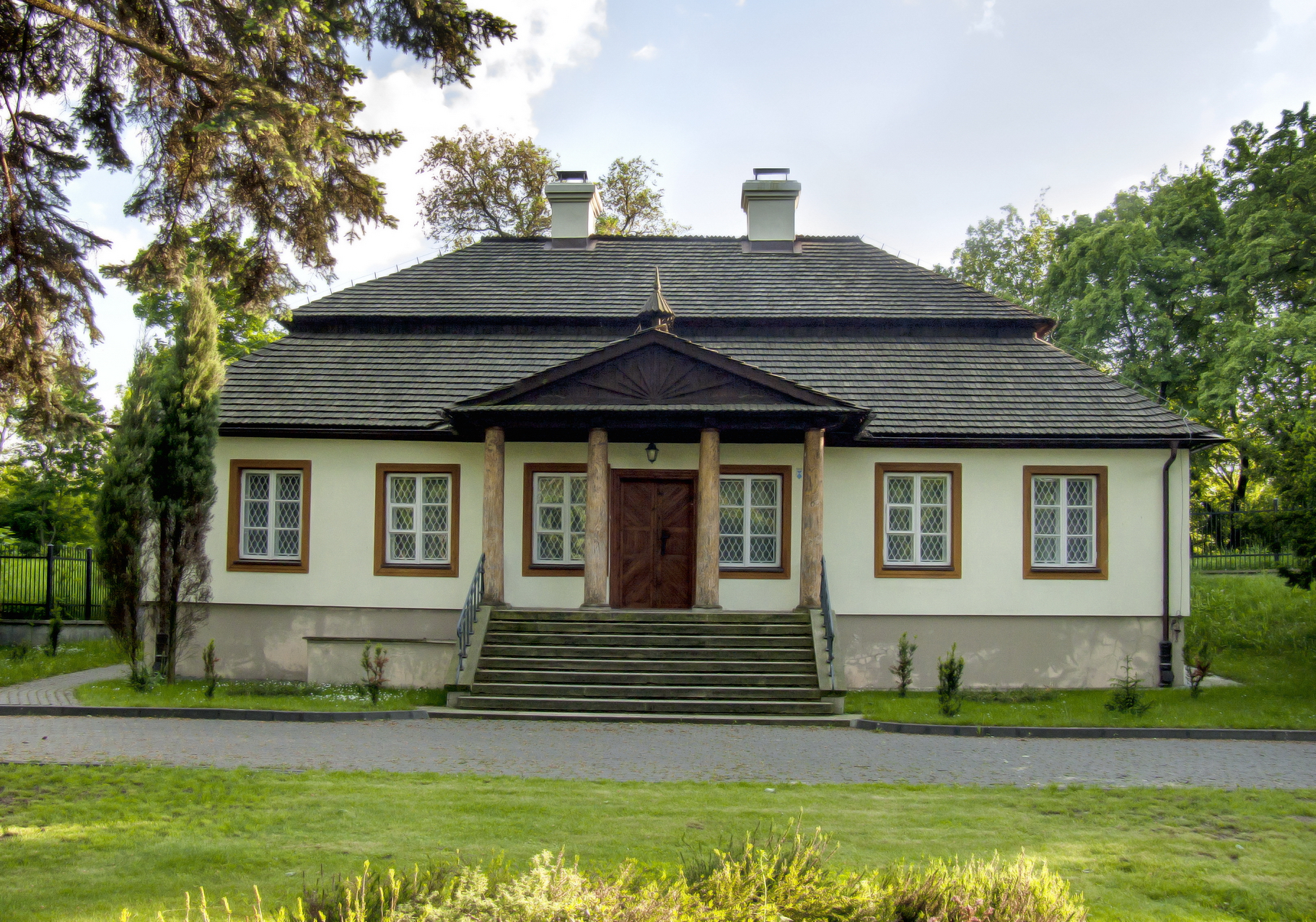 Dwór Mostowskich, Warszawa ul. Mehofera